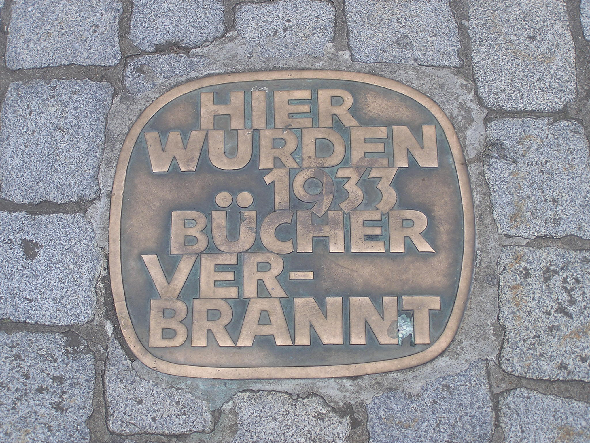 Plakette zum Gedenken an die Bücherverbrennung 1933 in Erlangen